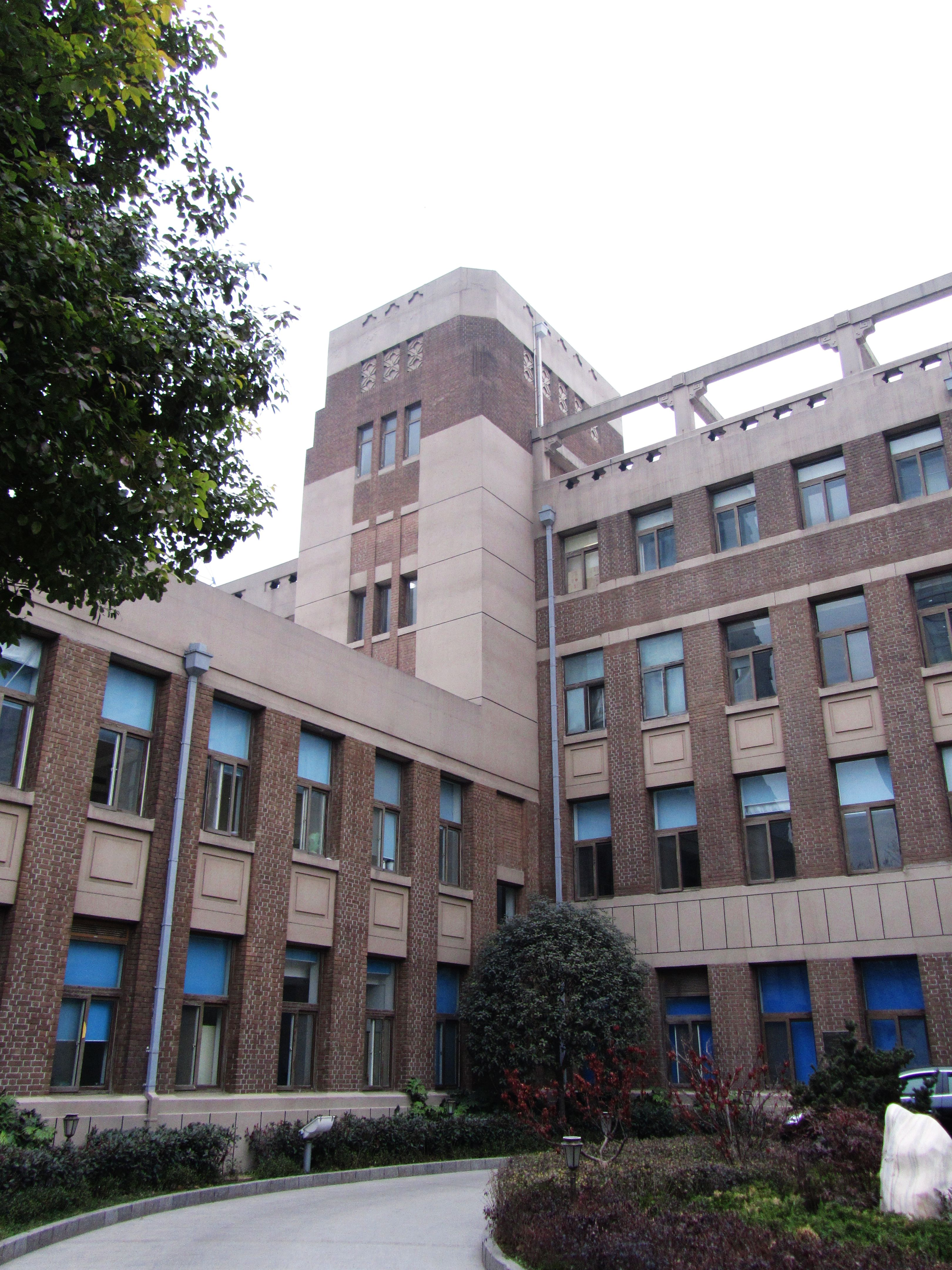 南京中央医院旧址，此为左侧塔楼。